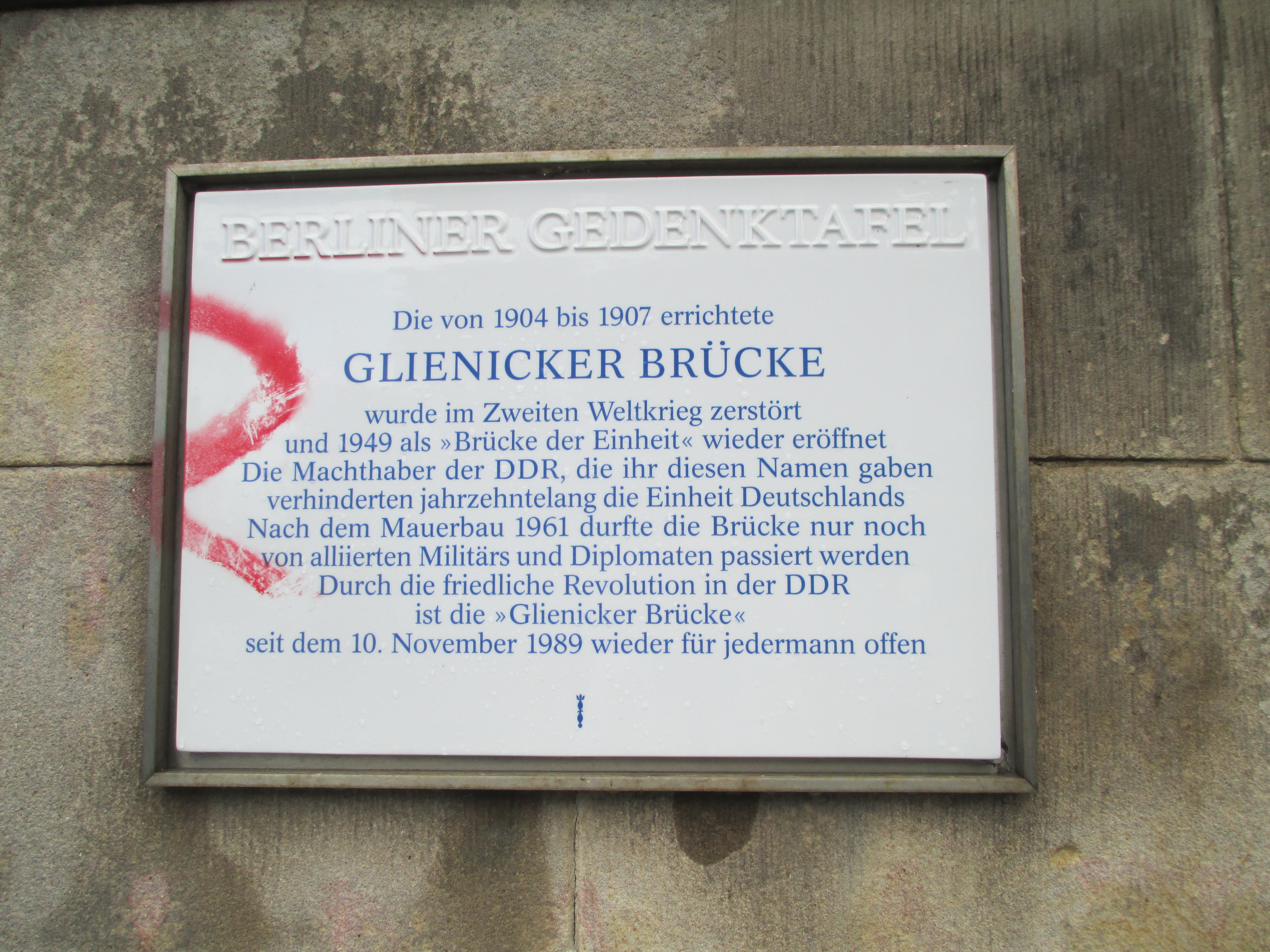 לוחית זיכרון בגשר גליניקה בברלין